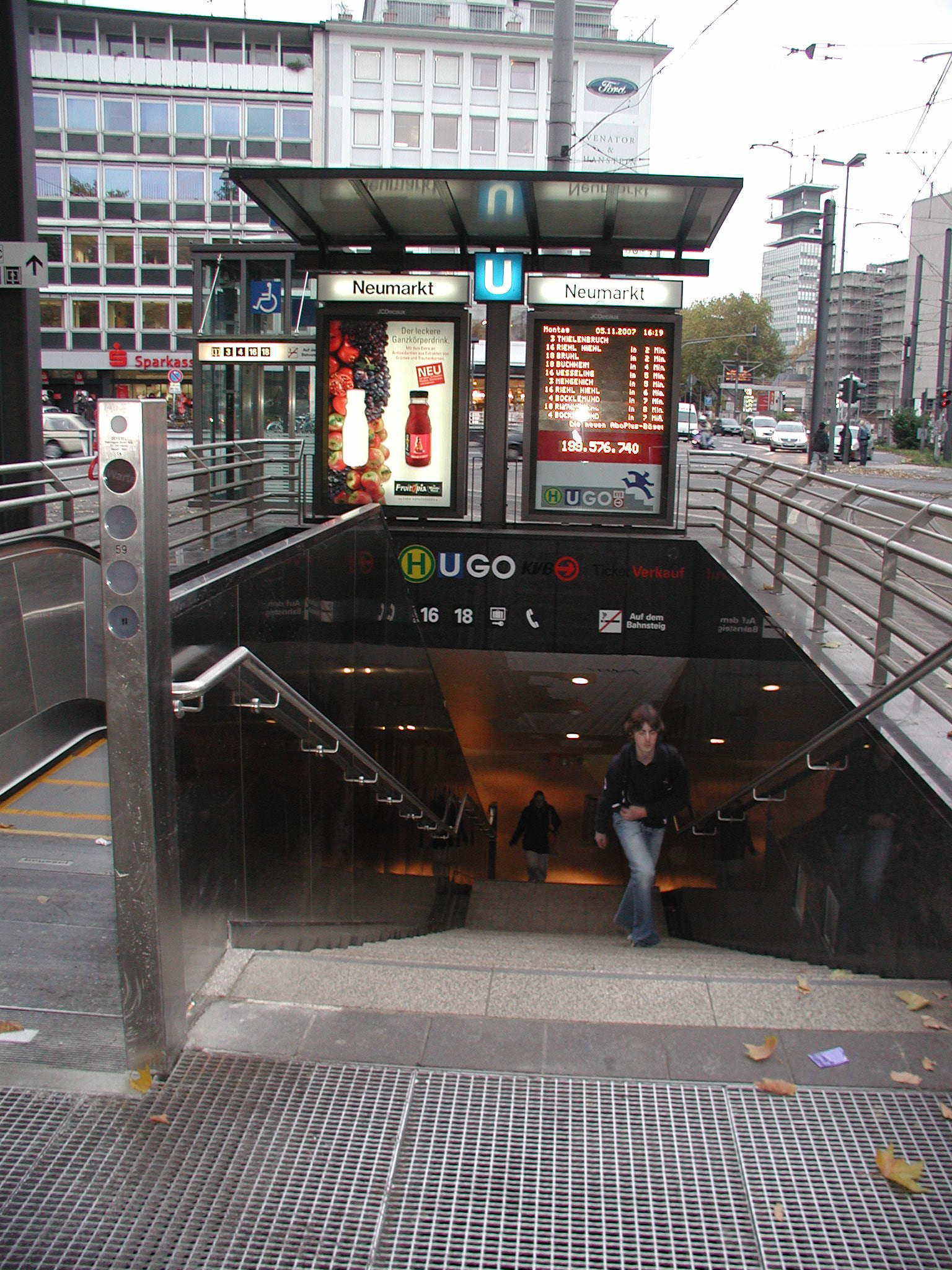 Köln Neumarkt, U-Bahn